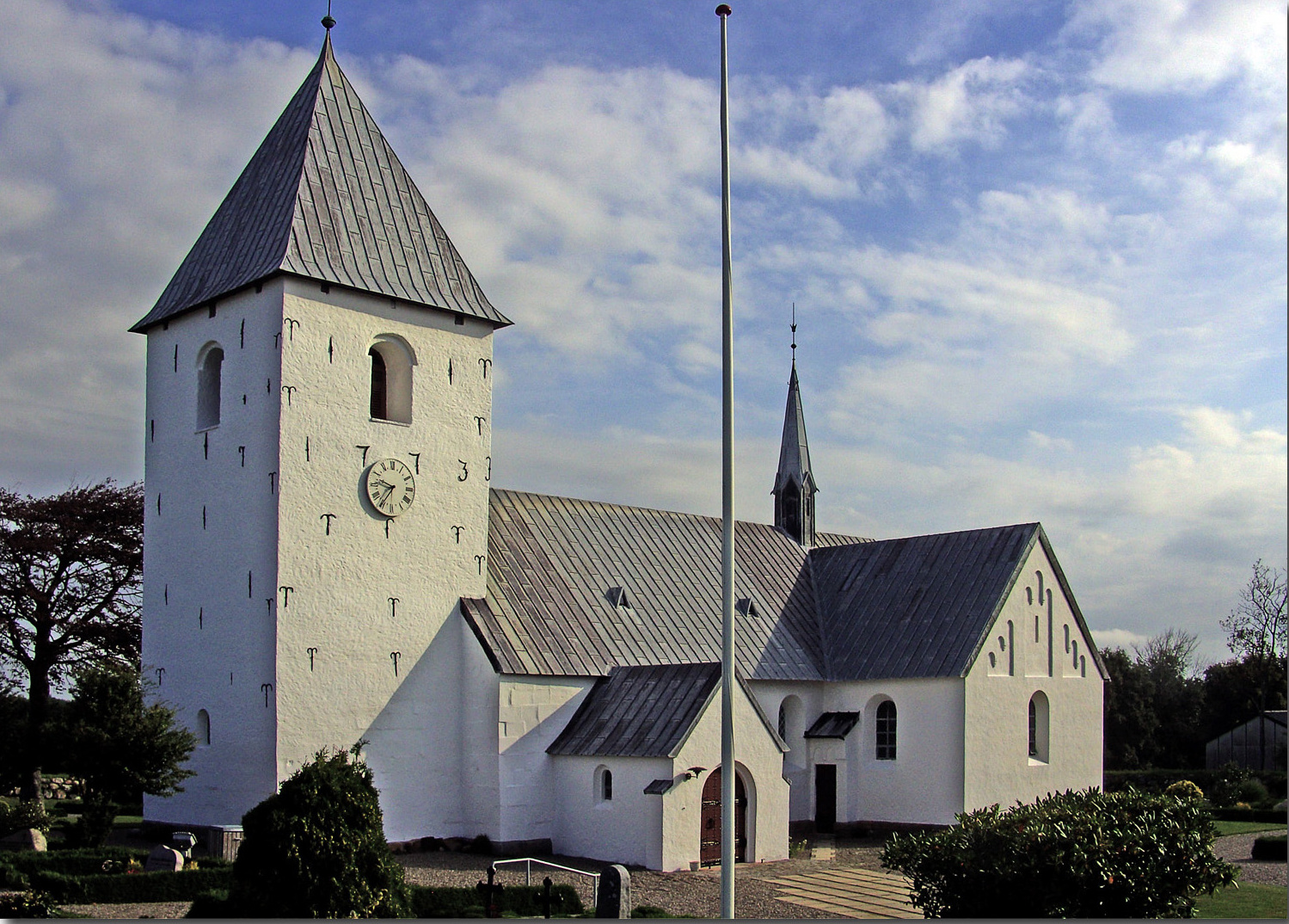 fra sydvest